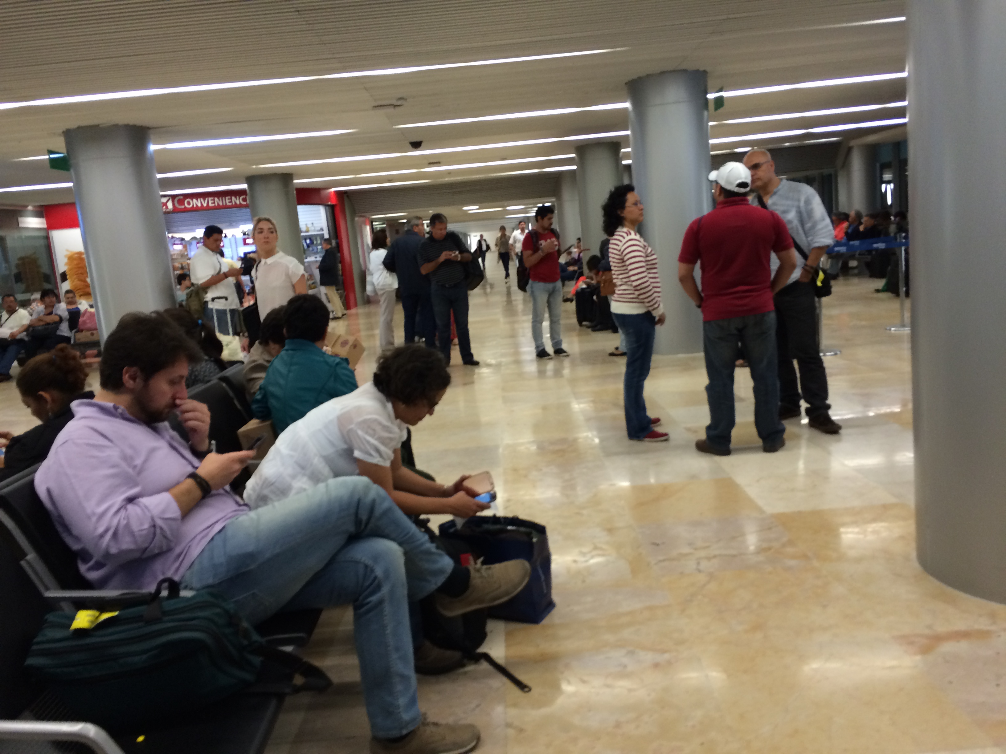 Sala B del Aeropuerto de Mérida.